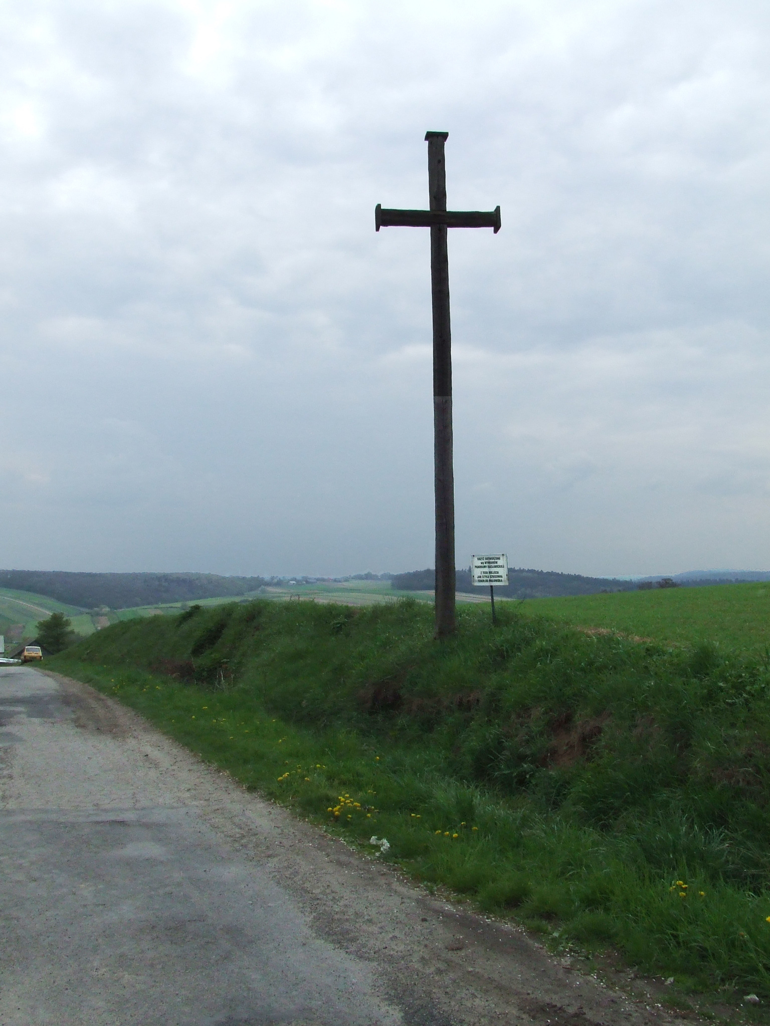 Racławice: the cross made after "Panorama Racławicka"/Racławice: krzyż wykonany na podstawie "Panoramy Racławickiej"